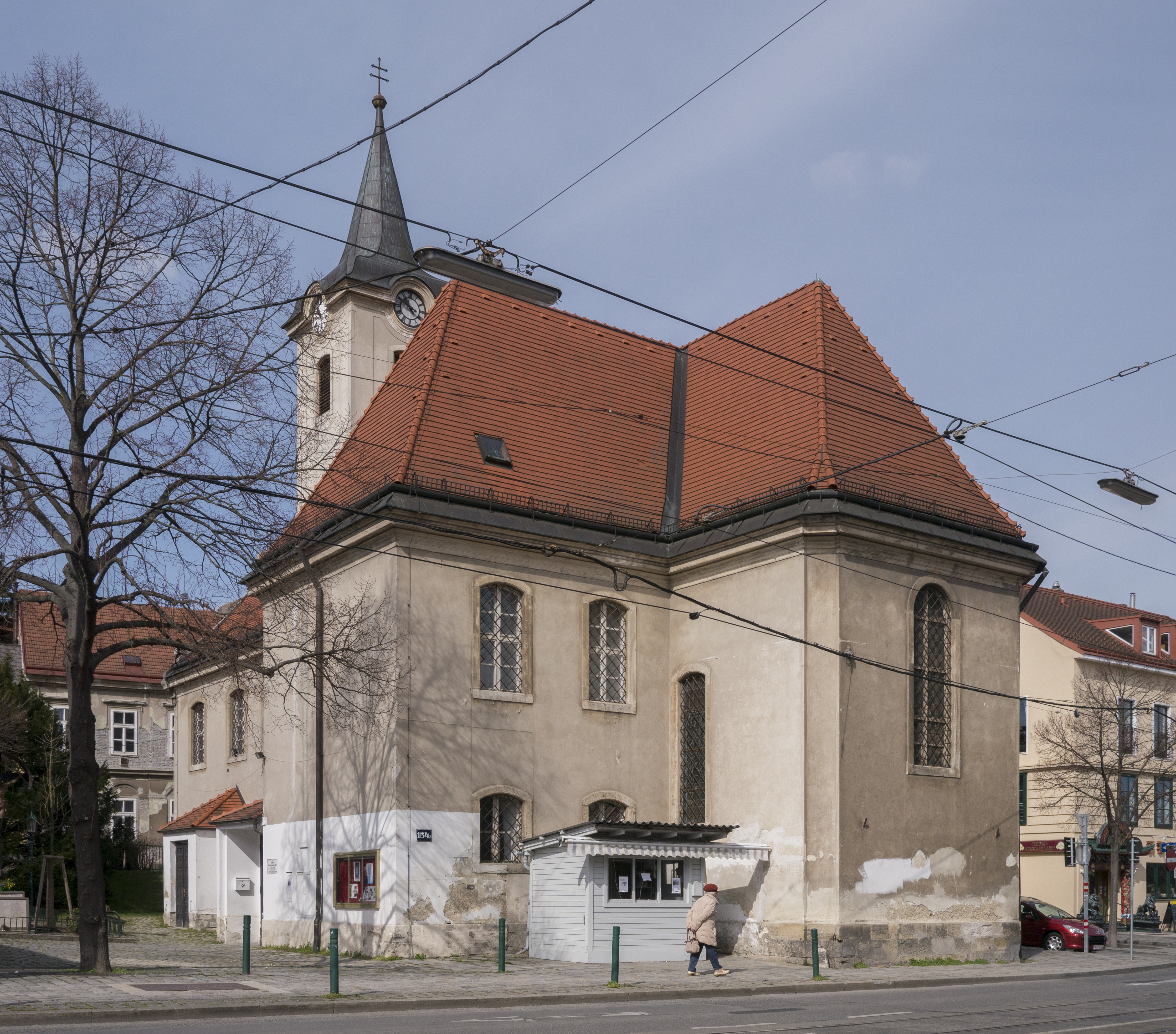 Ehem. Lainzer Pfarr- und Wallfahrtskirche Hl. Dreifaltigkeit